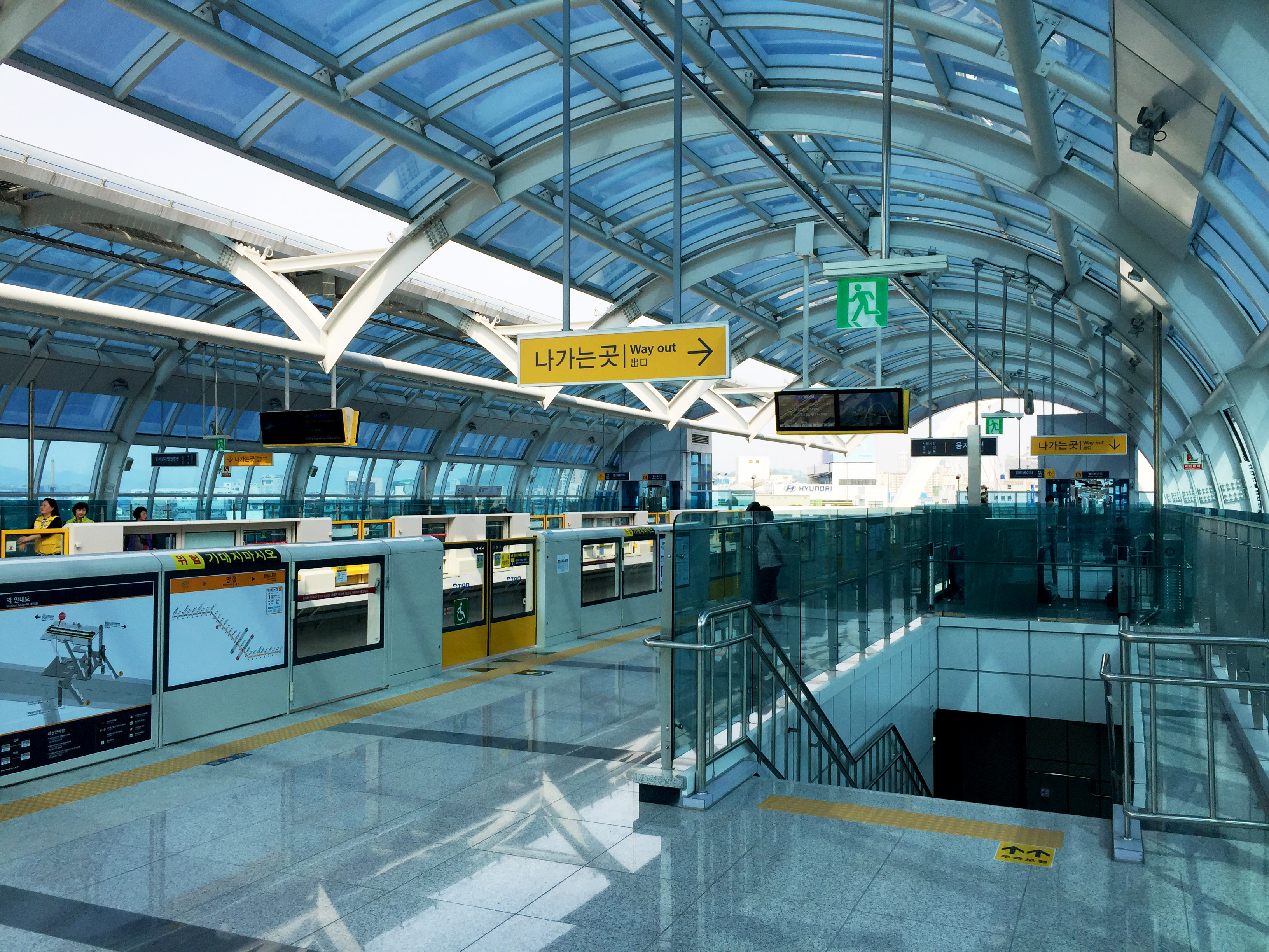 만평역 승강장